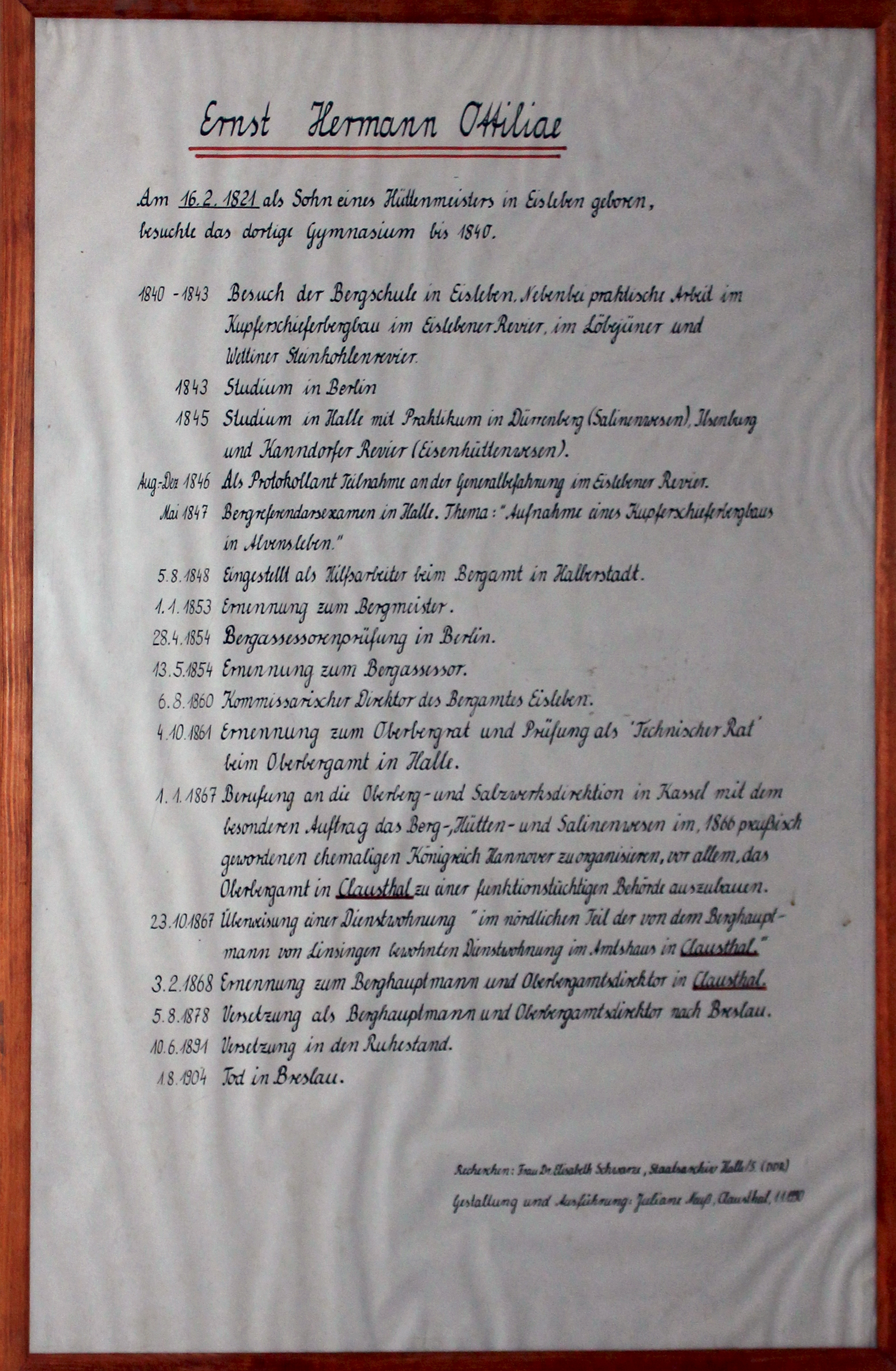 Infotafel im Fördermaschinengebäude des Ottiliae-Schachtes in Clausthal-Zellerfeld. Niedersachsen, Deutschland.